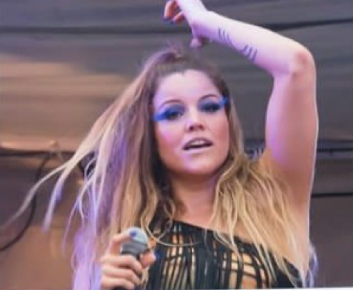 Fantine no Bloco Chá Rouge, em 2018.